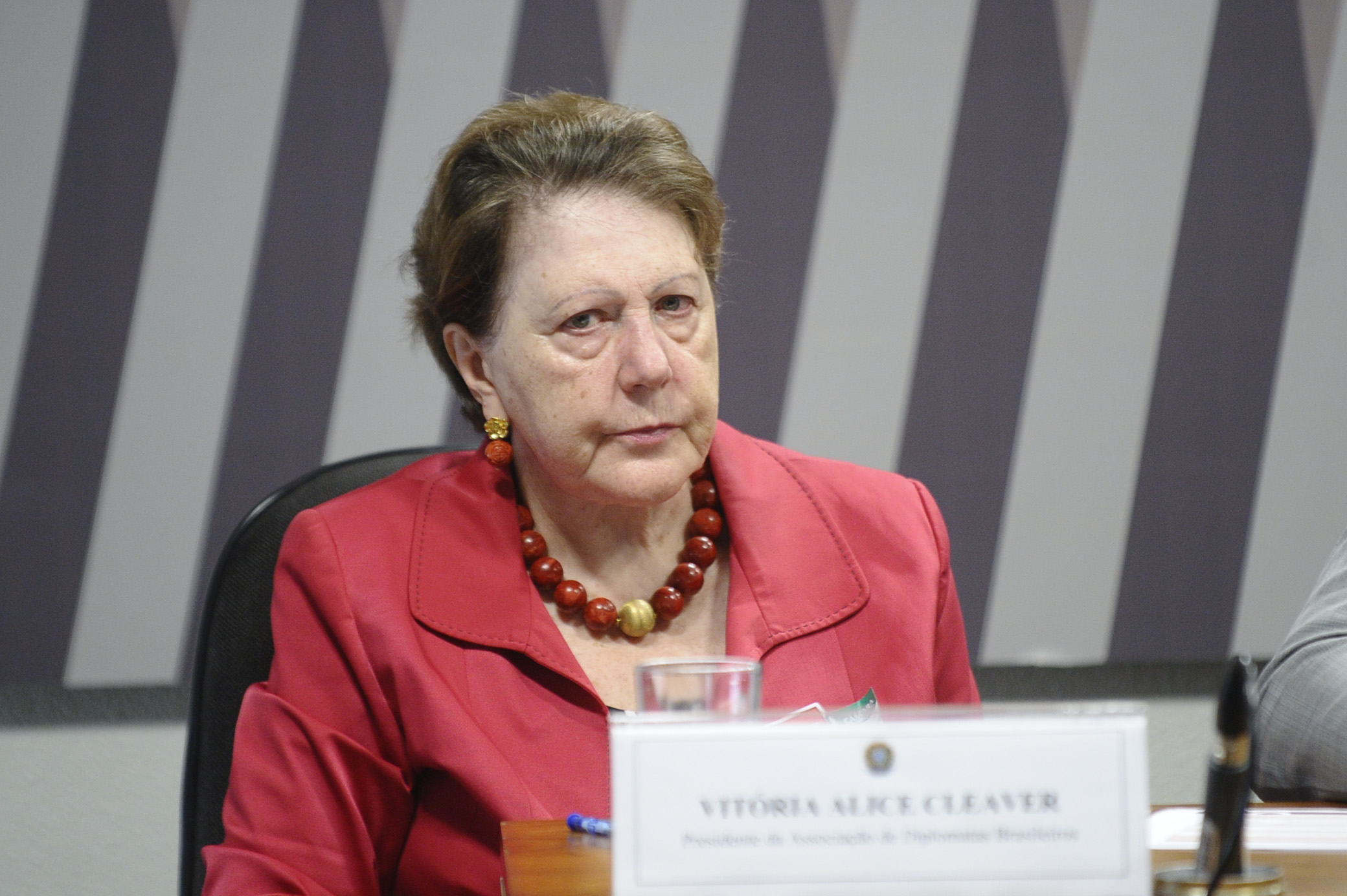 Comissão Mista da Medida Provisória nº 689, de 2015 que obriga o servidor público licenciado sem remuneração a continuar contribuindo para o regime previdenciário, realiza audiência pública interativa. Pres. da Associação de Diplomatas Brasileiros, Vitória Alice Cleaver. Foto: Marcos Oliveira/Agência Senado